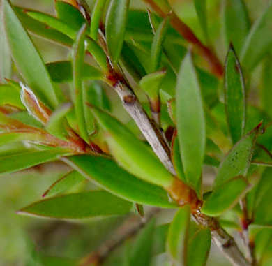 Detalle de las hojas del árbol Melaleuca Alternifolia